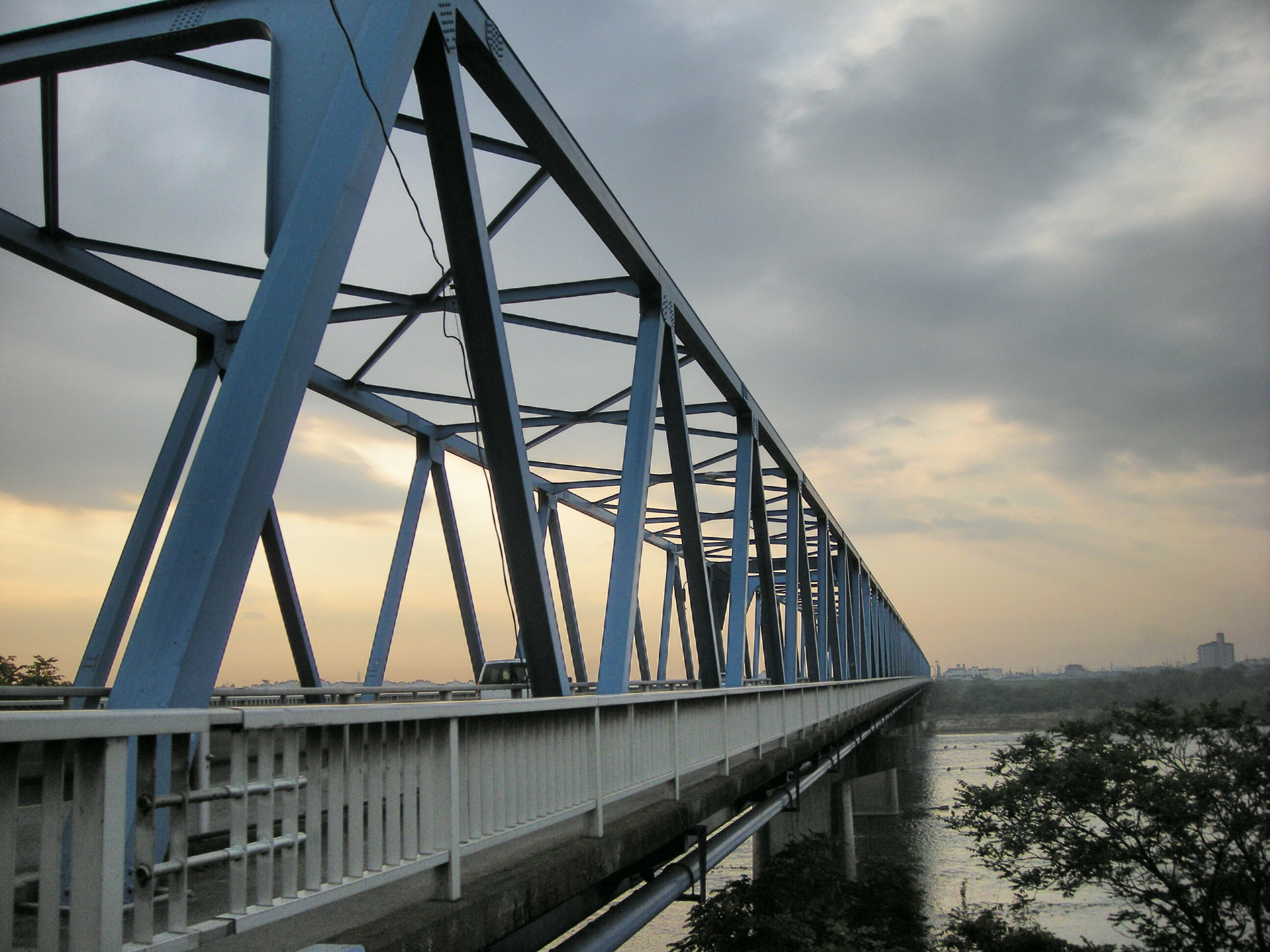 aigioohashi bridge（愛岐大橋）